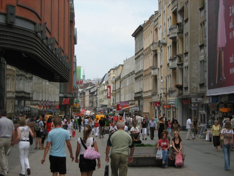 Ulica Półwiejska w Poznaniu